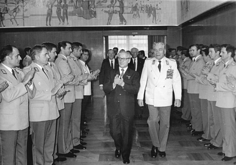 Berlin, Militärakademie- Absolventen, Empfang ADN-ZB Link 27.10.80 Berlin: Empfang- Der Vorsitzende des Staatsrates und des Nationalen Verteidigungsrates der DDR, Erich Honecker, empfing im Amtssitz des Staatsrates Absolventen der Militärakademie "Friedrich Engels", der Militärpolitischen Hochschule "Wilhelm Pieck" und von sowjetischen Militärakademien. Die Ehrengäste, unter ihnen der Minister für Nationale Verteidigung der DDR, Armeegeneral Heinz Hoffmann (Mitte r.), wurden von den Offizieren mit Beifall begrüßt. (siehe weitere Fotos, frei bei ADN-Meldung)